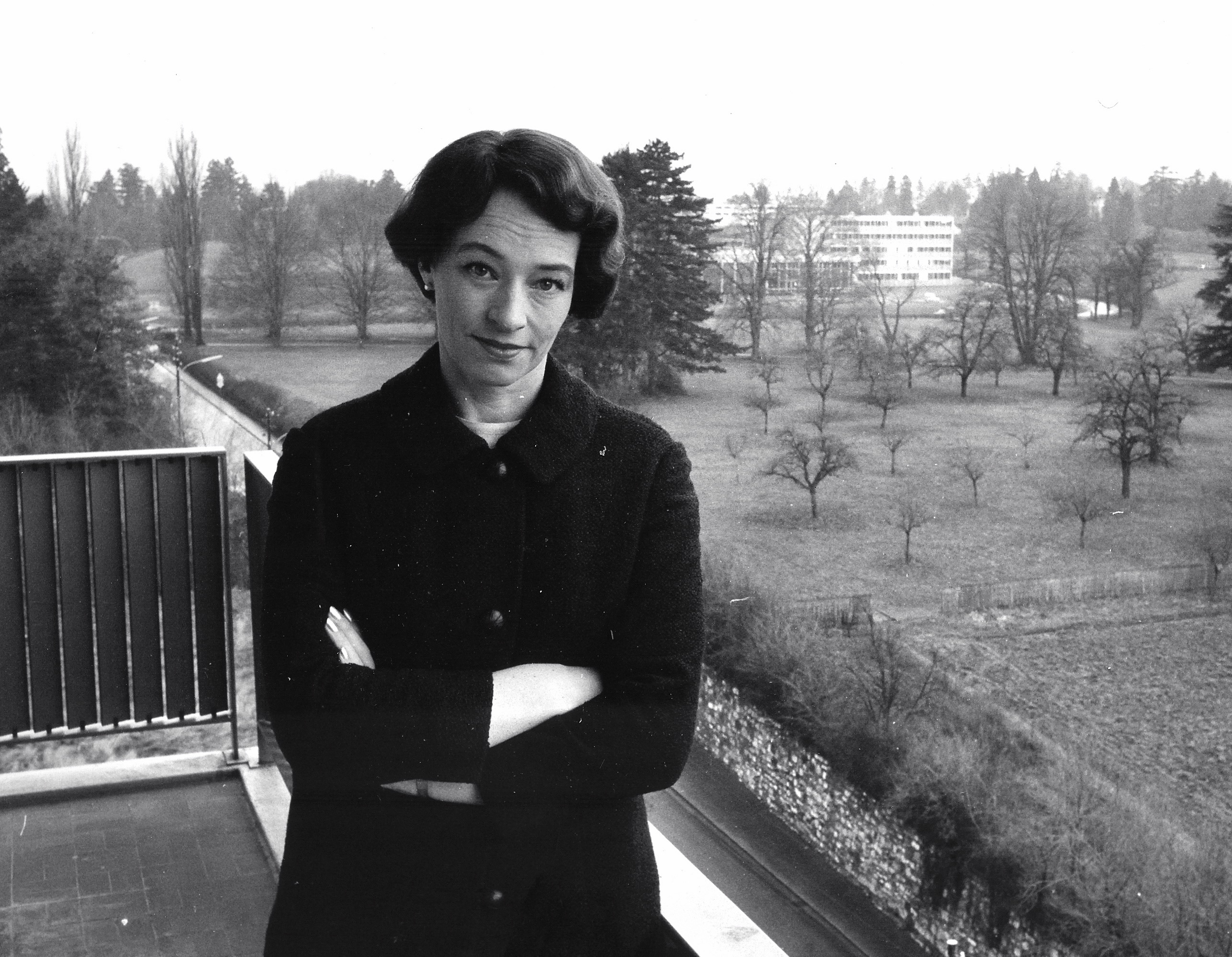 Barbro Beer, dåvarande byråchef på EFTA (European Free Trade Association) i Genéve 1965.